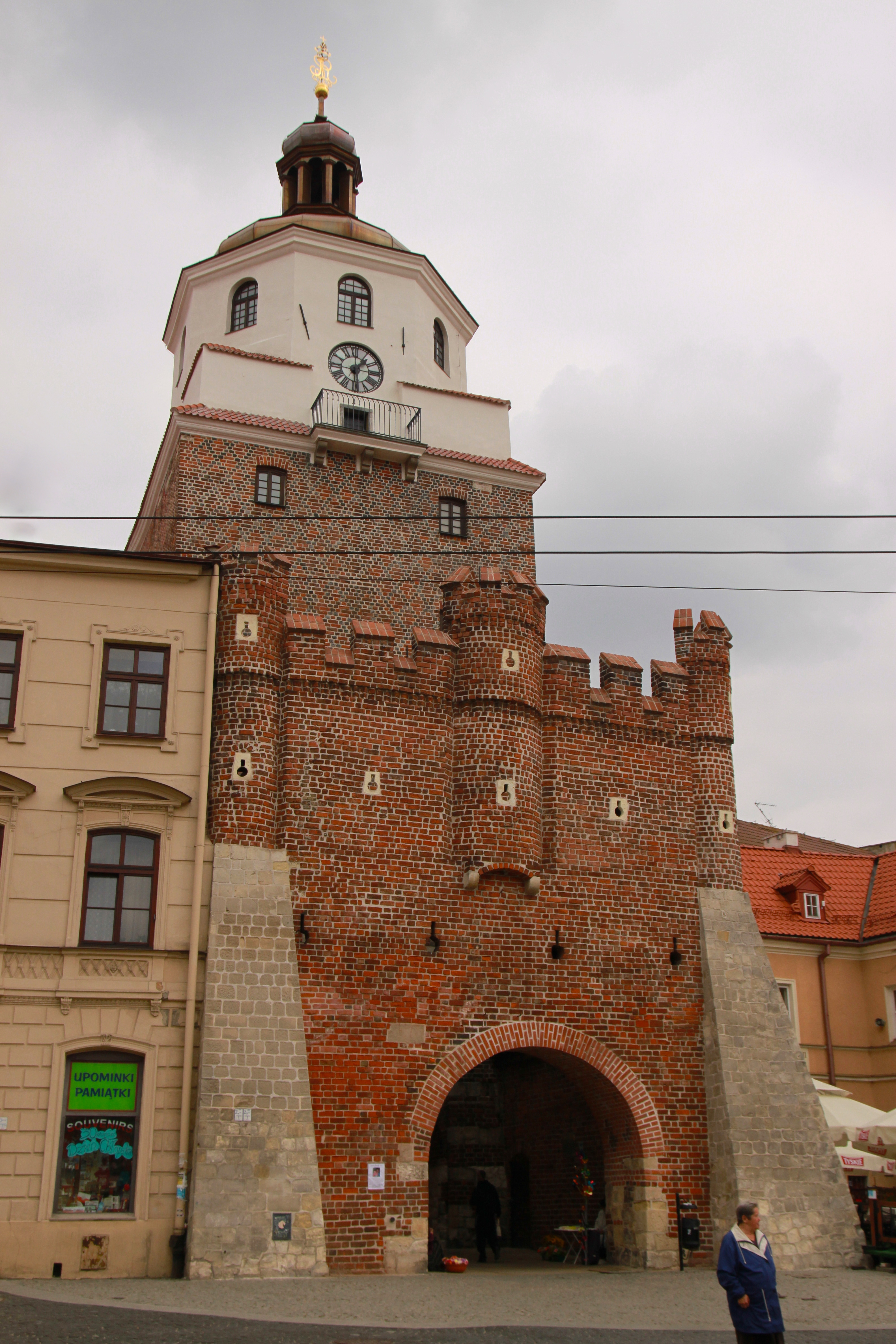 Brama Krakowska, Stare Miasto Lublin